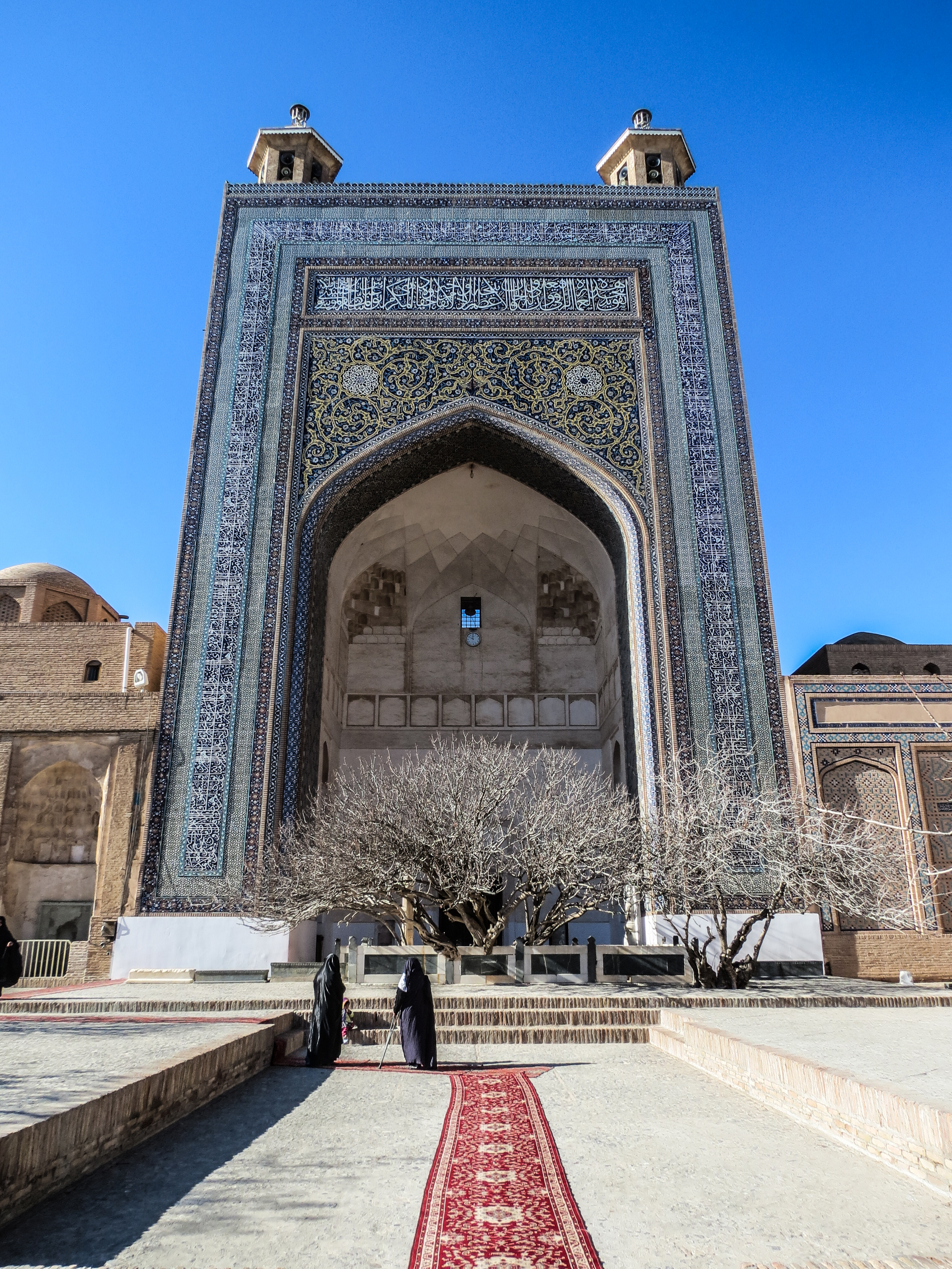 مقبره تربت شیخ جام و ملحقات آن